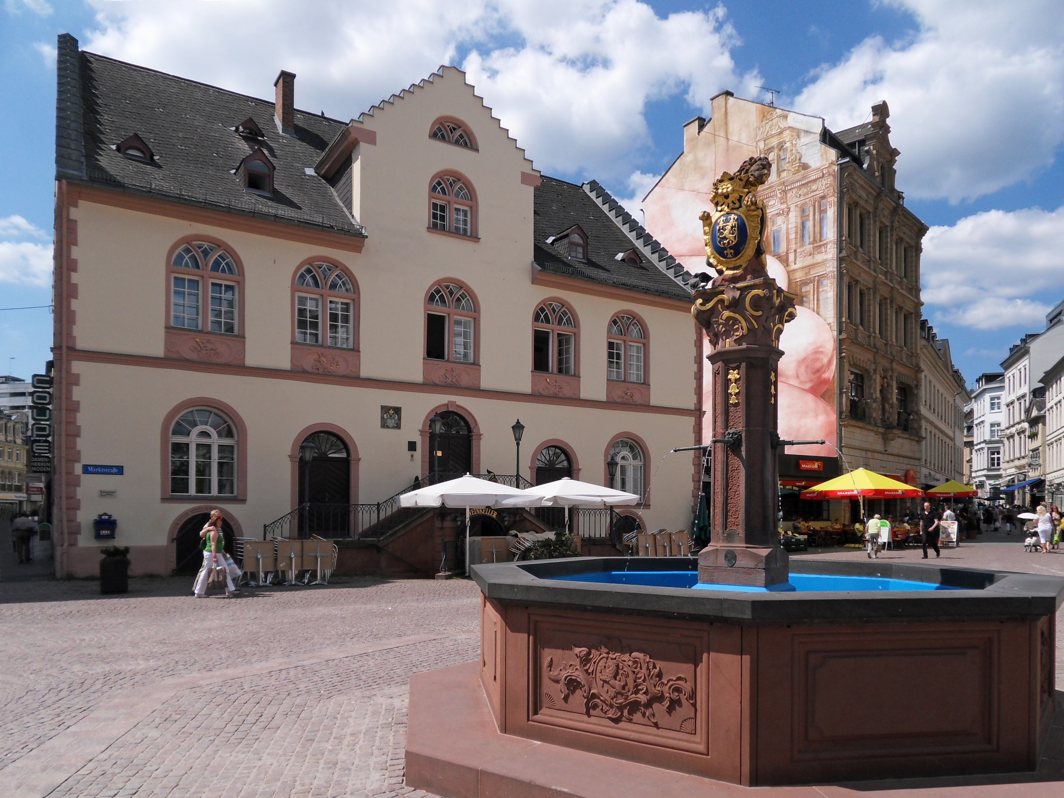 Blick aus Südosten auf den Marktbrunnen von 1753 vor dem Alten Rathaus von 1610. Darin ist das Wiesbadener Standesamt untergebracht.